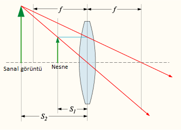 İnce kenarlı mercekte görüntü ve nesne